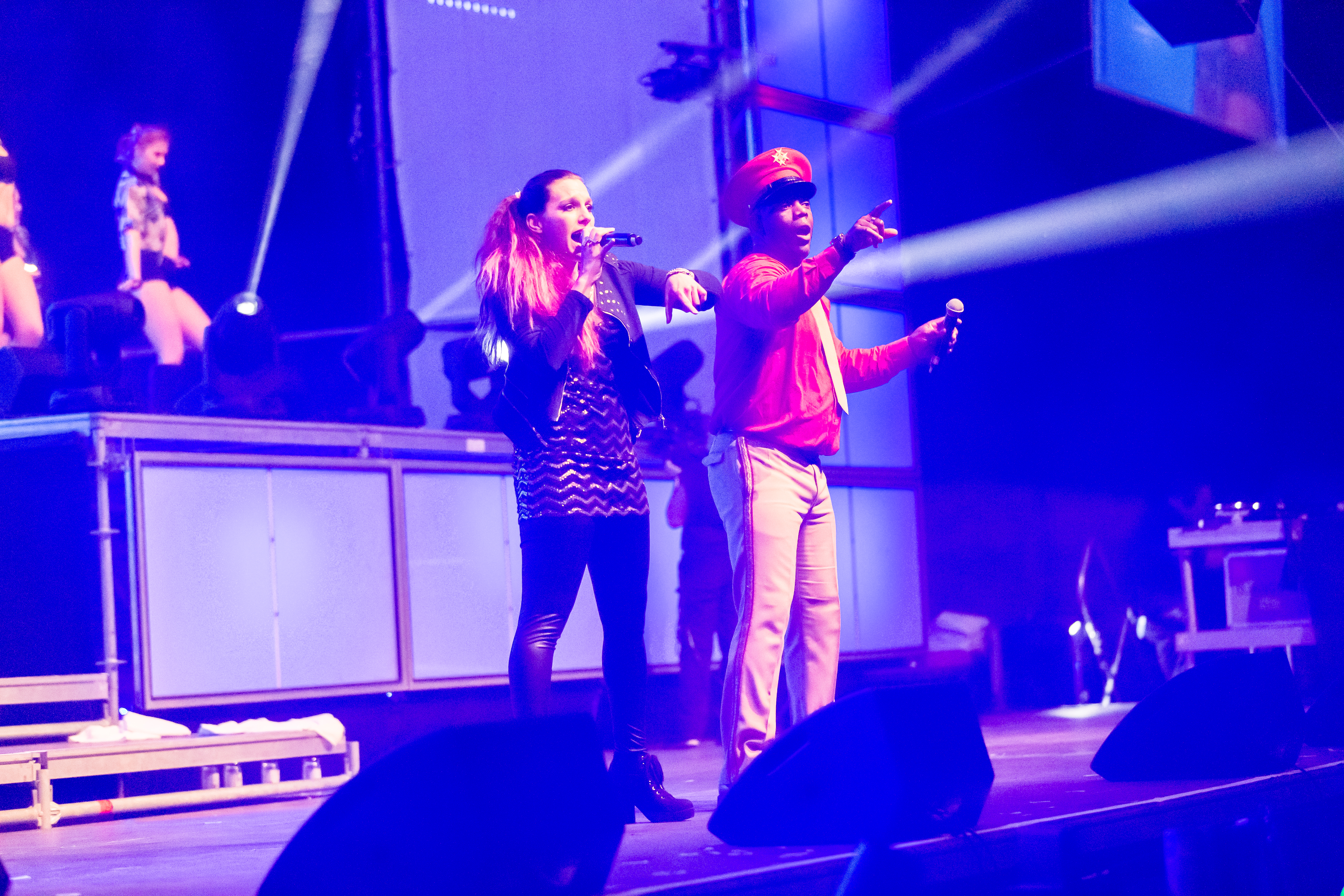 Captain Jack during sunshine live "Die 90er - Live on Stage" at Maimarkt Halle, Mannheim, Baden-Württemberg, Germany on 2015-11-28, Photo: Sven Mandel